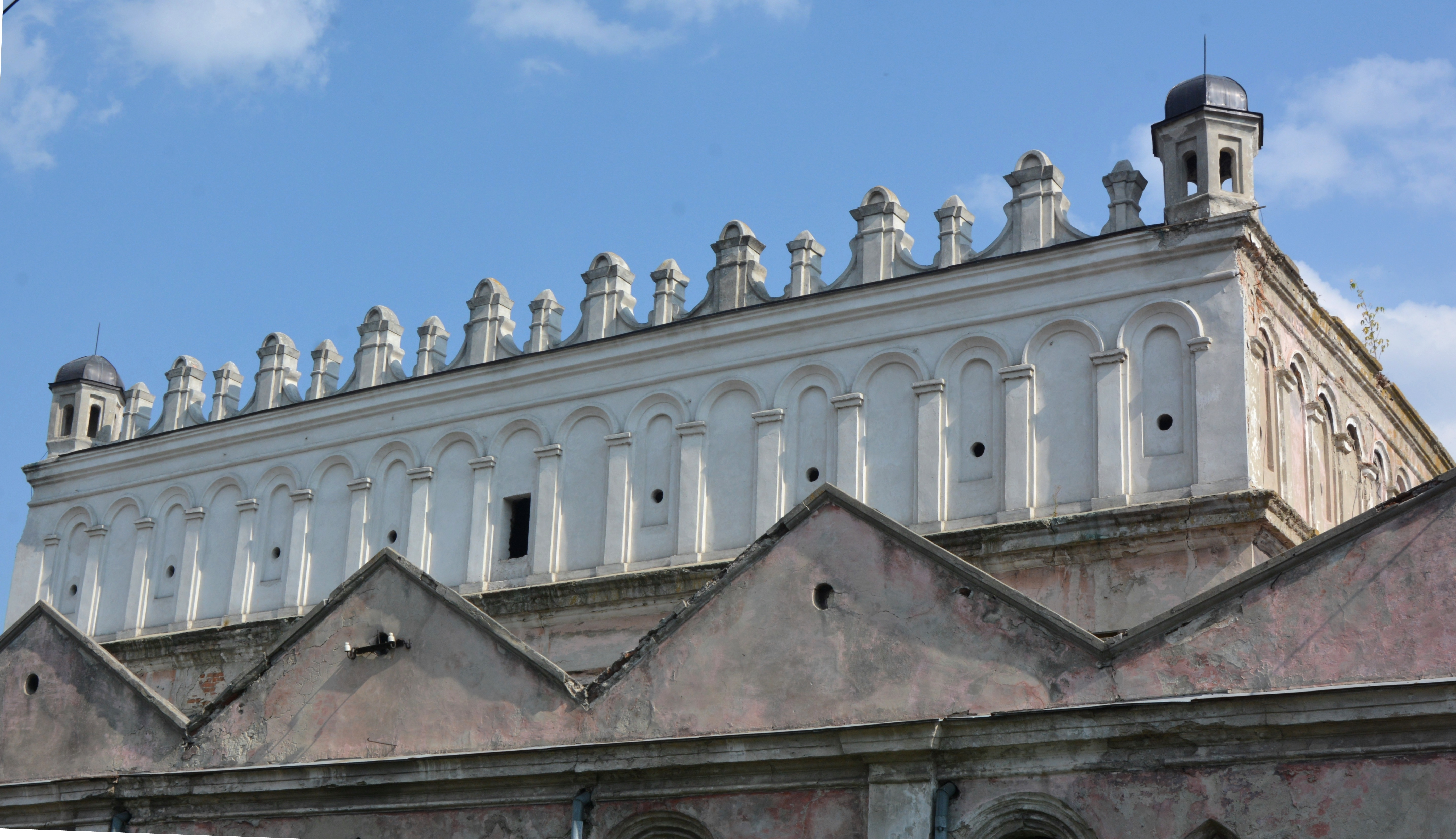 Синагога (мур.), Жовква, вул.Запорізька